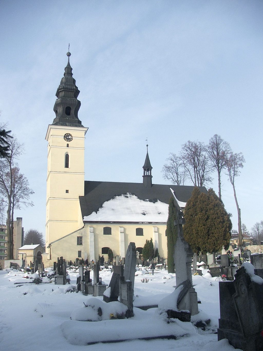 Staré Město (okres Šumperk). Kostel sv. Anny a hřbitov